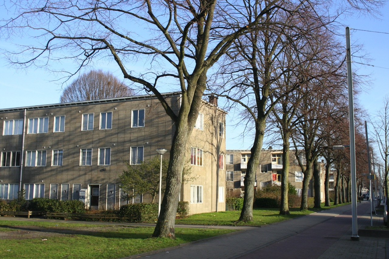 Aireywoningen aan de Burgemeester de Vlugtlaan te Slotermeer, Amsterdam Nieuw-West.